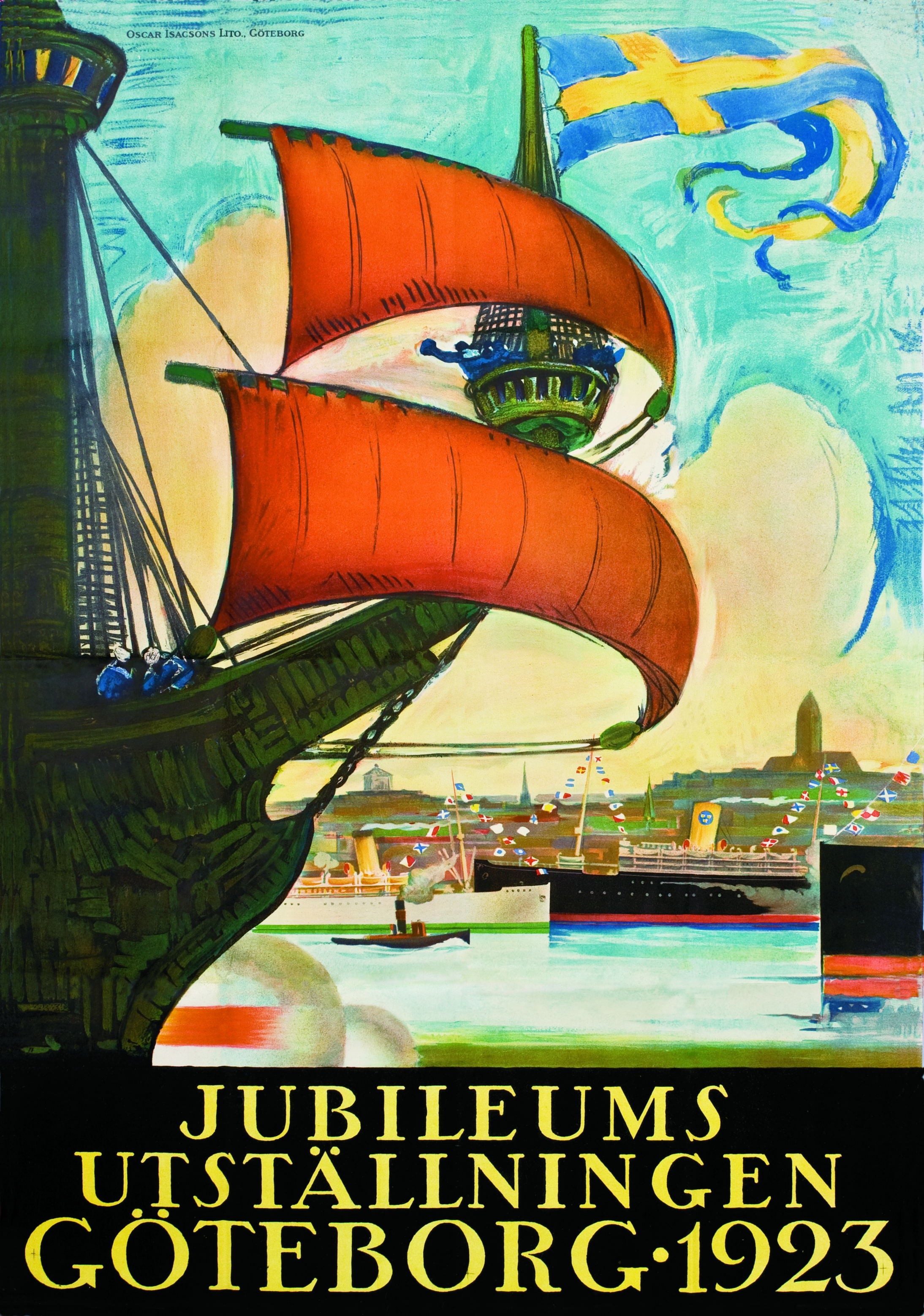 Affisch för Jubileumsutställningen i Göteborg 1923.